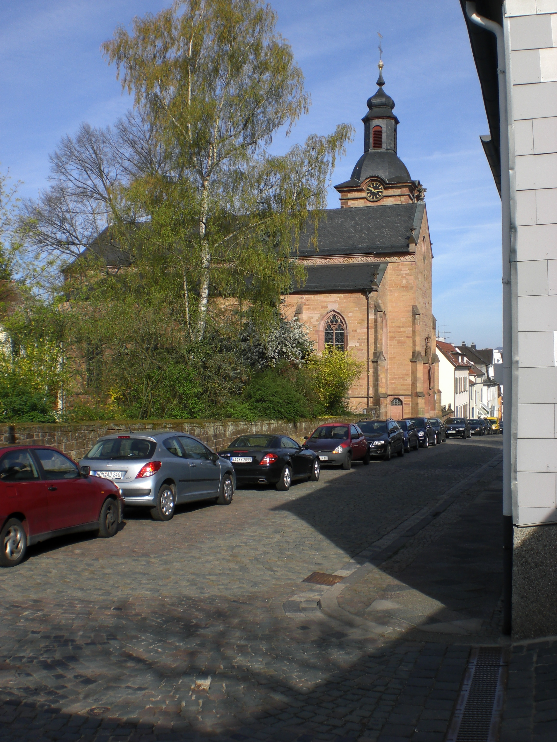 Protestantische Stadtkirche Homburg, Kirchenstraße